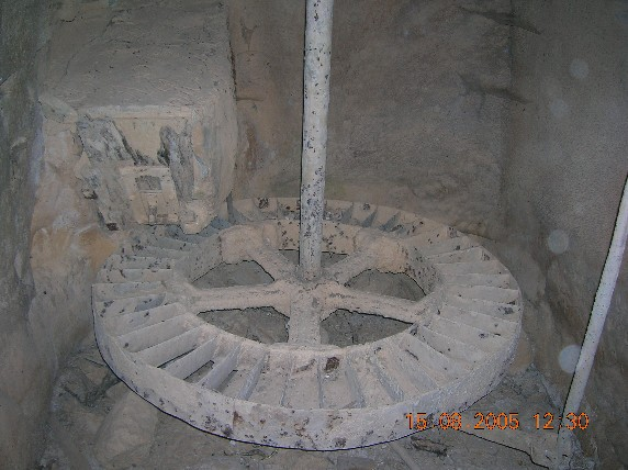 Imagen del sistema impulsor de un molino hidráulico: saetin concentrador y rodezno horizontal.